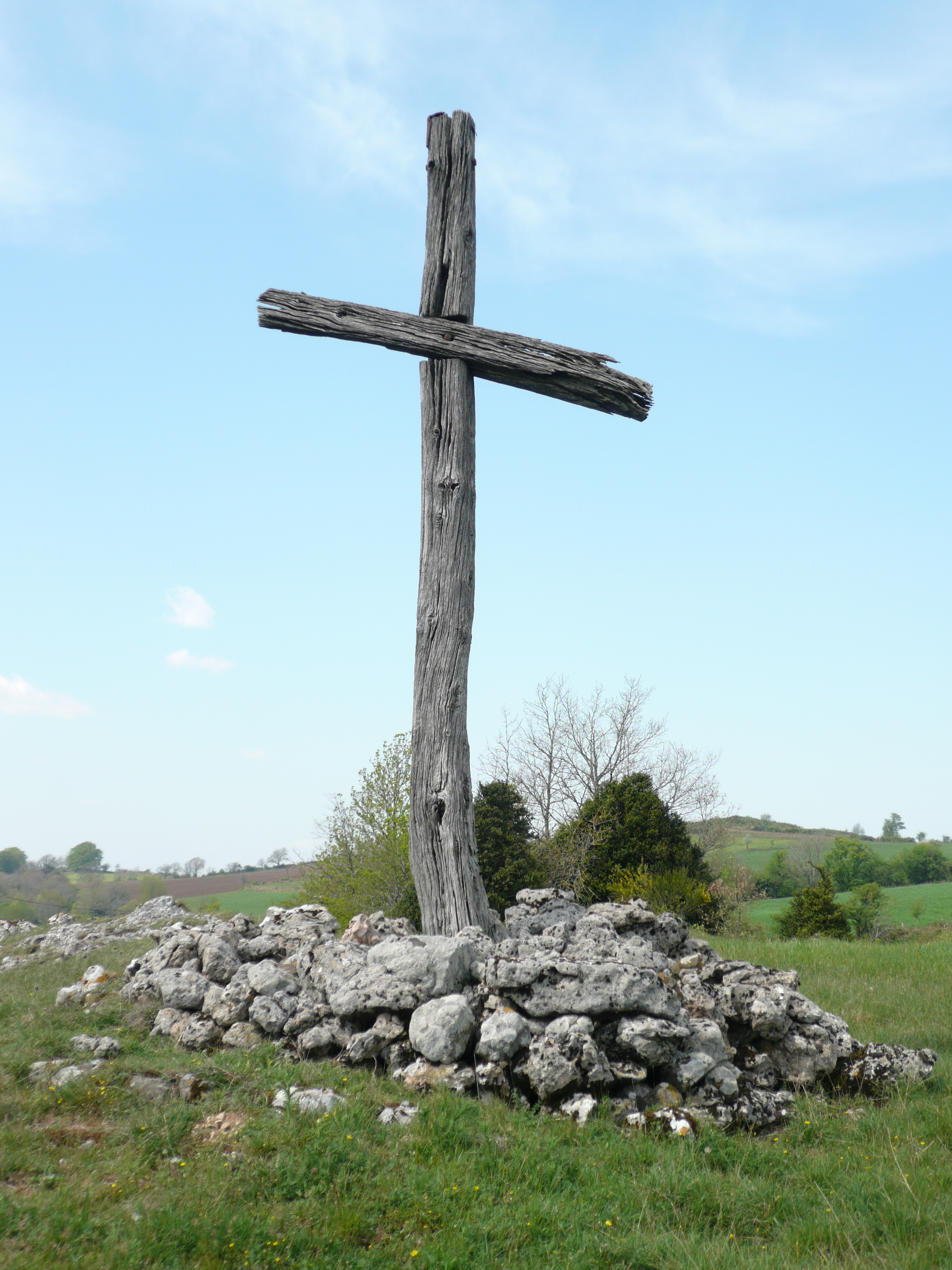 Croix sur le plateau du Larzac France entre "Les Rives et La Bastide des Fonts"